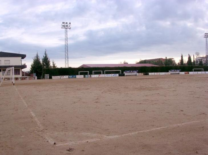 Camp de futbol de Solsona a l'any 2006